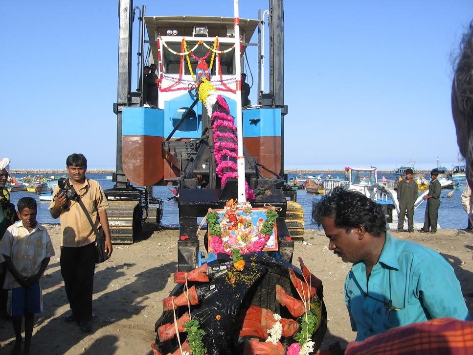 דוברת חפירה לקראת השקתה בנמל צ'נאי הודו